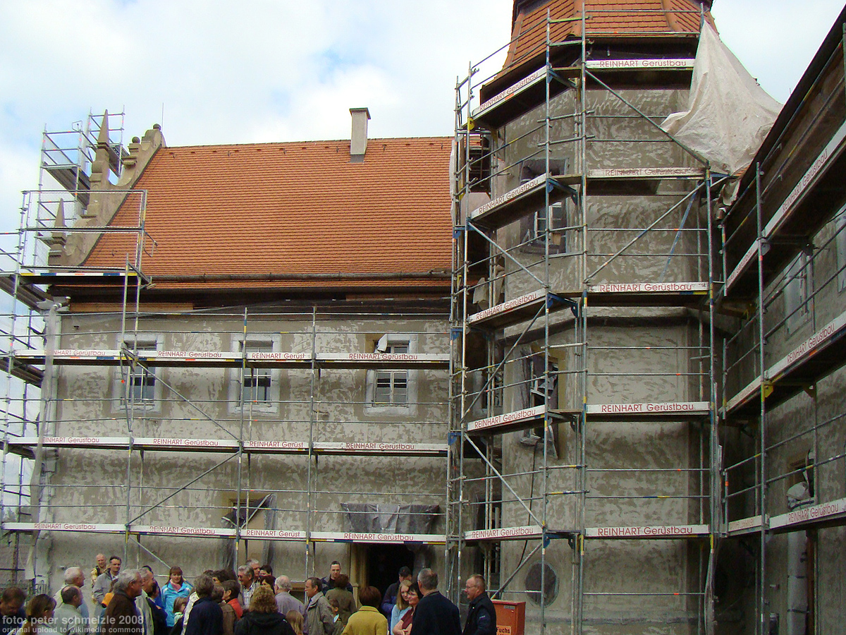 Innenhof des Greckenschlosses in Bad Friedrichshall-Kochendorf, Aufnahme am Tag des offenen Denkmals 2008 während der Sanierung des Gebäudes.